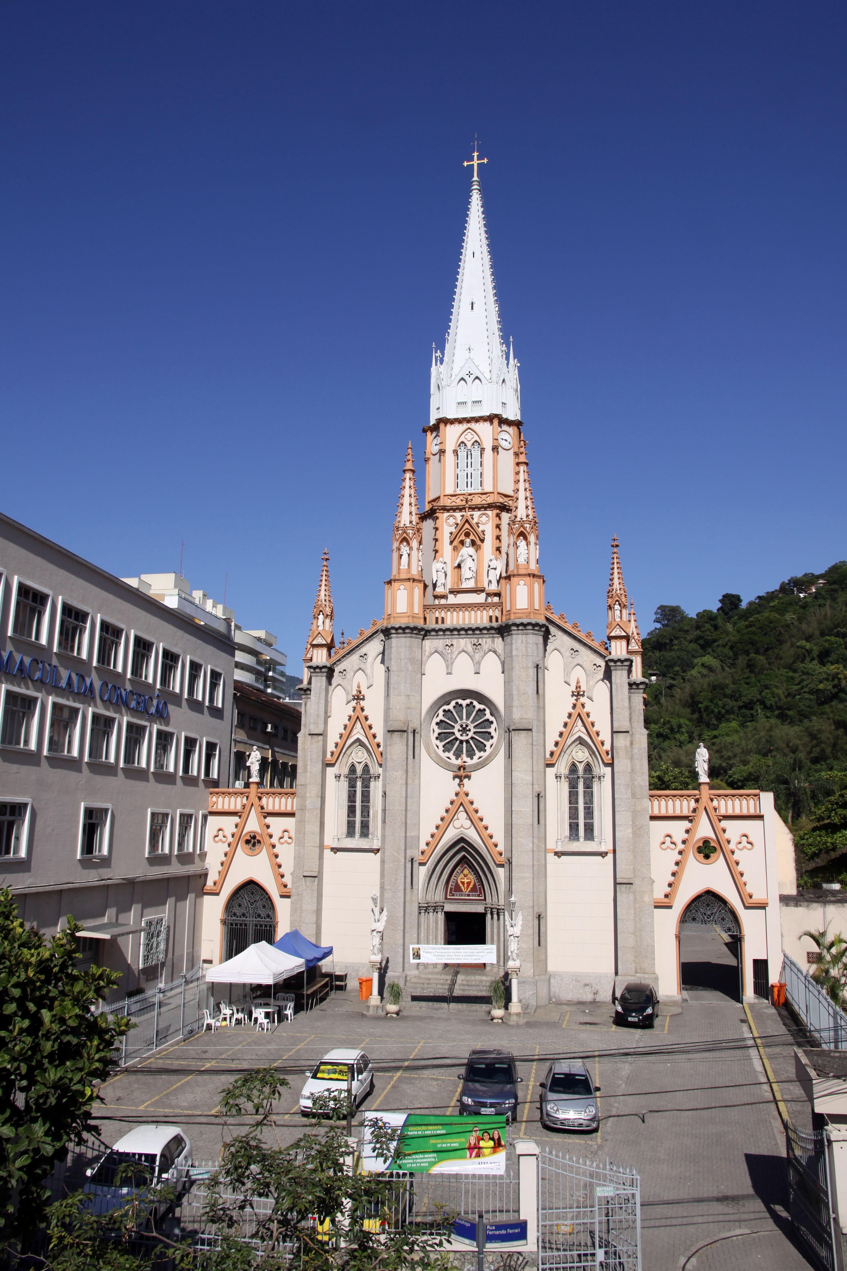 Basílica Imaculada Conceição na Praia de Botafogo. Endereço: Praia de Botafogo, 266; Bairro: Botafogo; CEP: 22250-040; Tel.: 2551-7948.